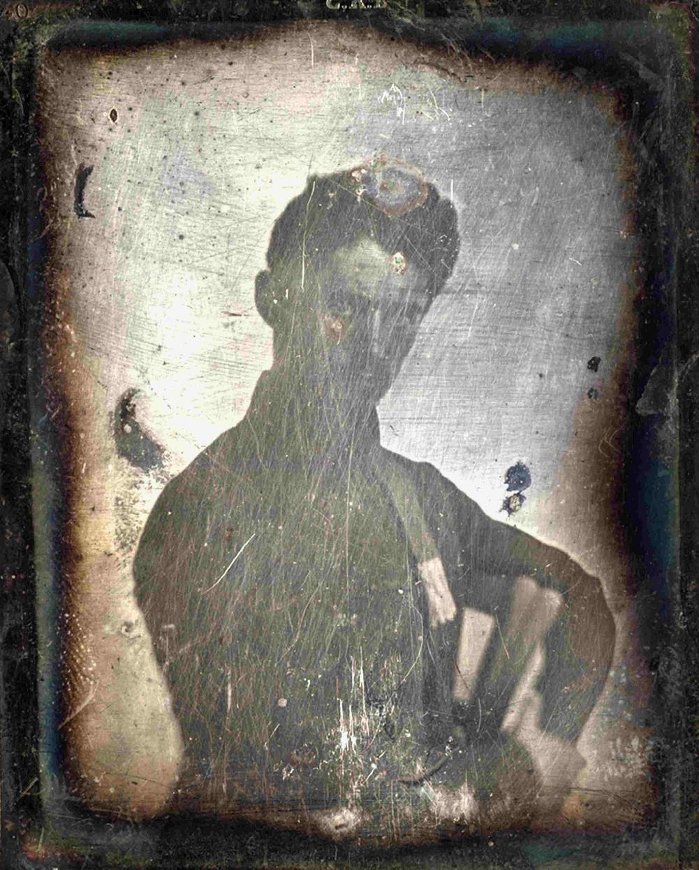 Petőfi Sándor. Az eredeti 1845-46 körül keletkezett dagerrotíp lemez feljavítás előtti állapota az 1970-es évek végén